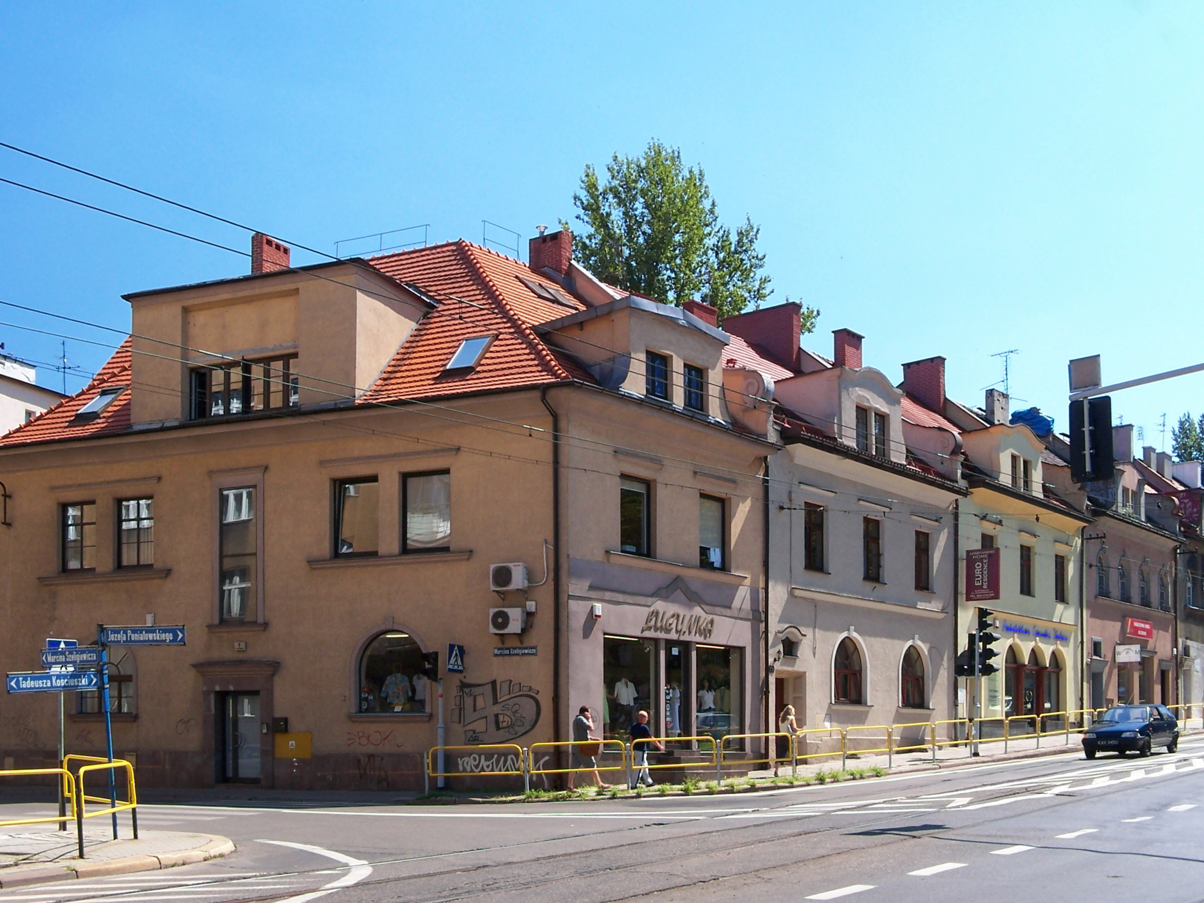 Domki przy ulicy Tadeusza Kościuszki w Katowicach.